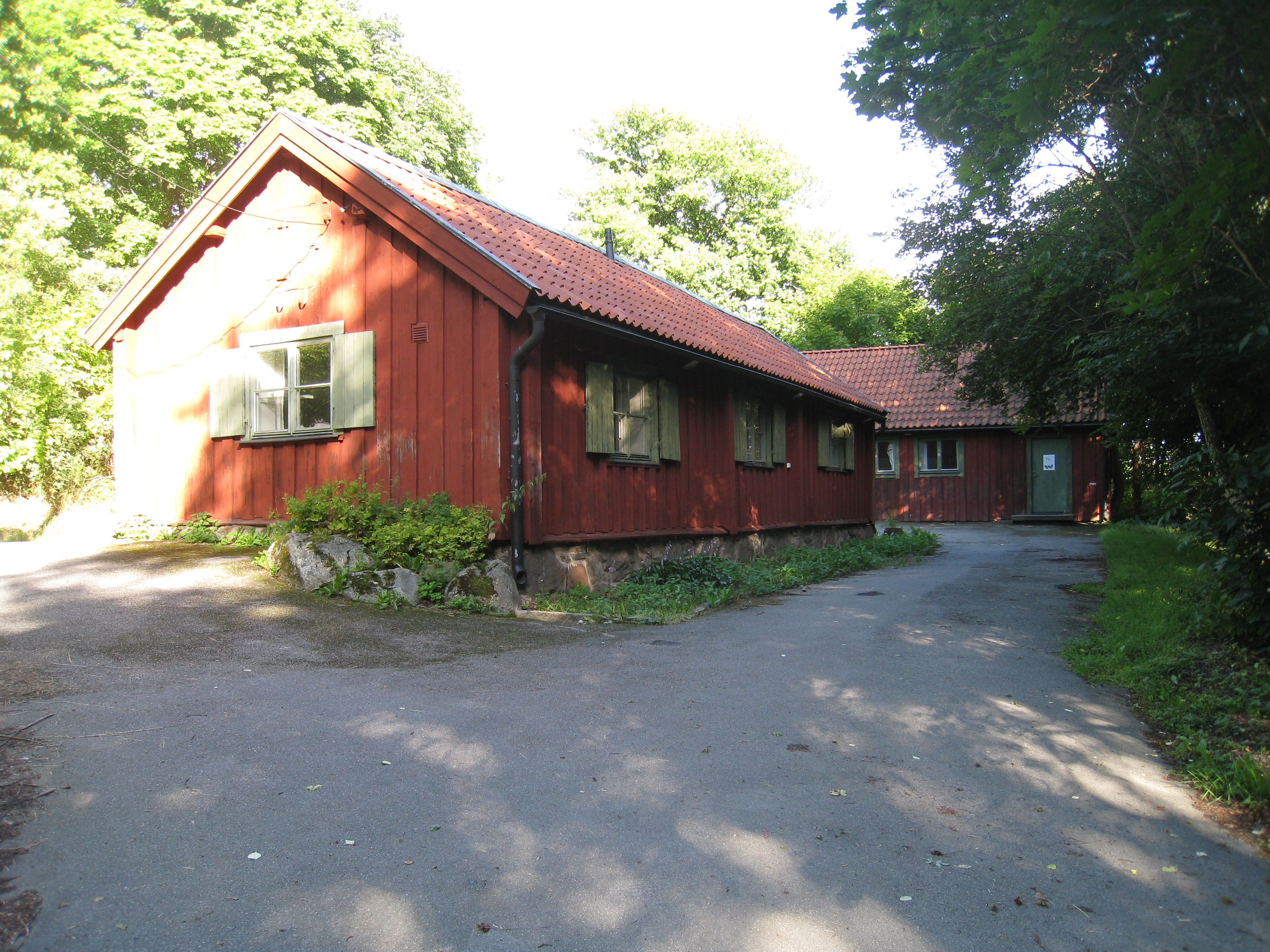 Karsviks Östergård i Norra Ängby, Bromma. Karsviks Östergård är en knuttimrad parstuga av nordländsk typ och består av förstuga, kammare, vardagsstuga (kök) och herrstuga (sal). Stugan antas vara byggd på 1600-talet och ligger i Karsviks hage vid Tegnebyvägen i Norra Ängby.